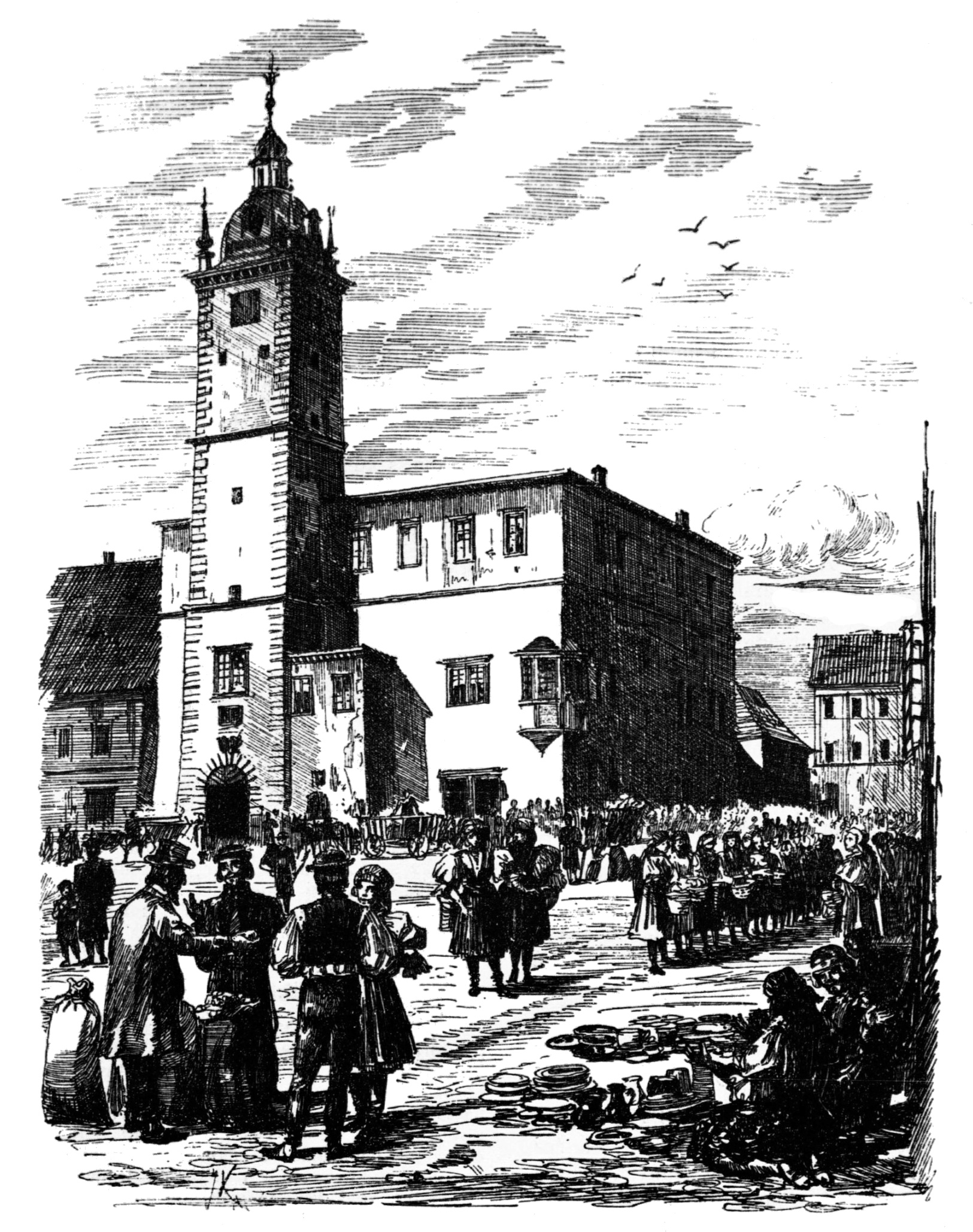 Náměstí v Kyjově na Moravě. Nakreslil prof. Jan Koula. Převzato ze Světozoru, ročník 21. č. 16, strana 253, vyšlo 11.3.1887